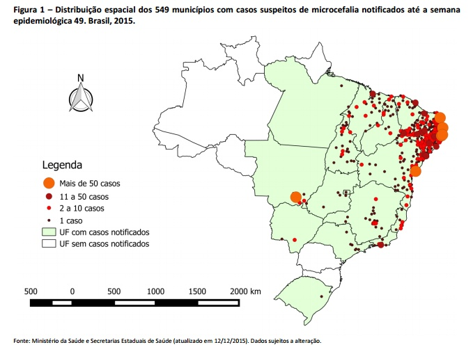 Monitoramento 06/12/2005 a 12/12/2015 - Casos suspeitos de microcefalia - Ministério da Saúde